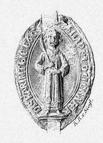 Philip von Spanheim